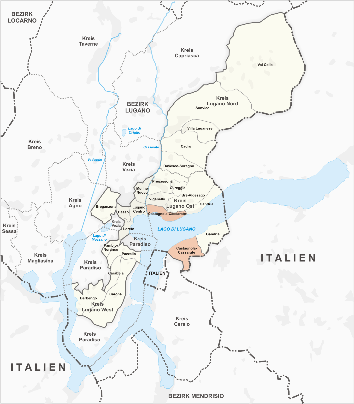 Quartier Castagnola-Cassarate